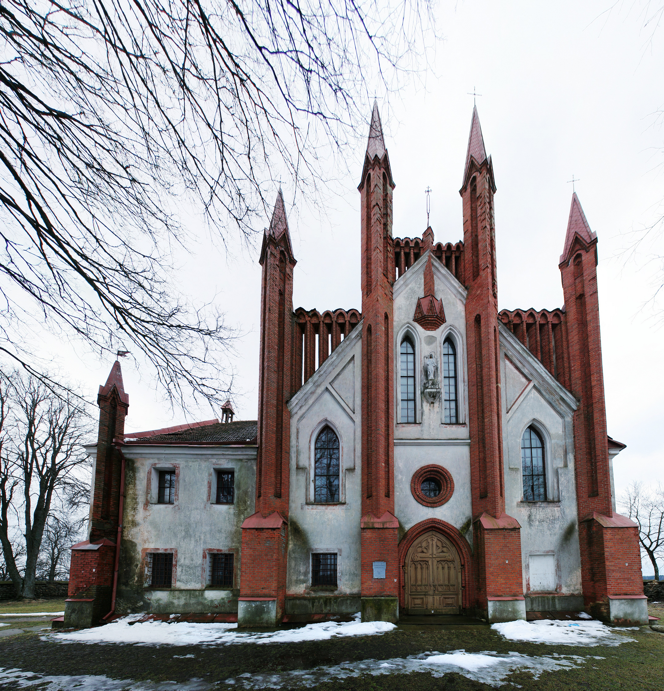 Senieji Trakai Church facade